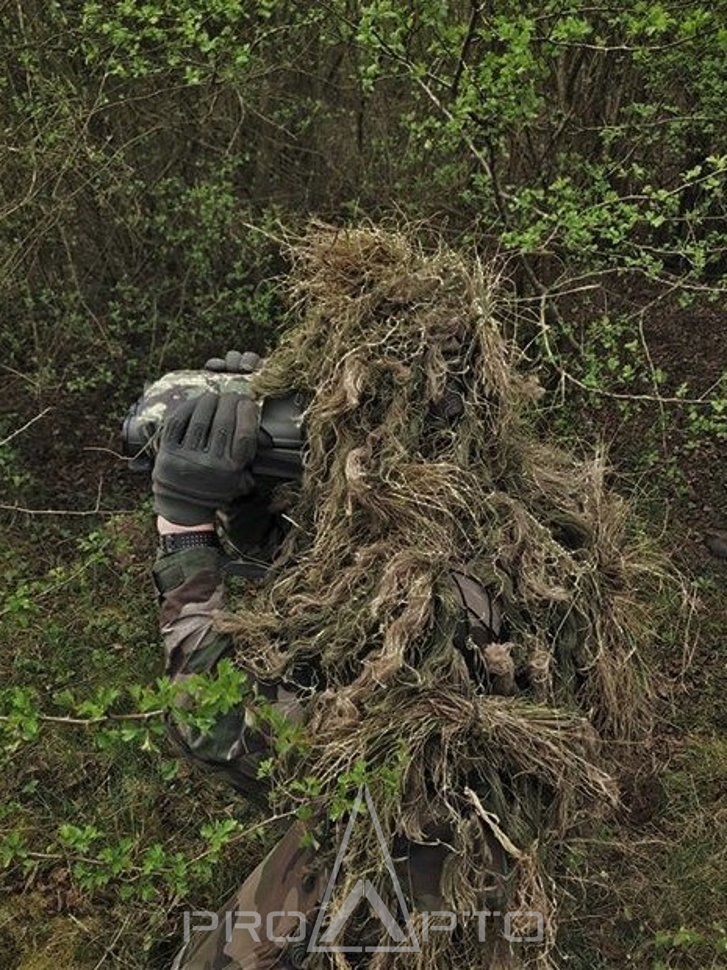 observateur de l'armée française utilisant un Multipurpose ProApto Ghillie Suit lors d'exercices de jalonnement